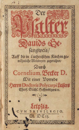 Cornelius Becker: Der Psalter Davids Gesangweis, Leipzig 1602 (Titelblatt), Reimfassung aller biblischen Psalmen für den Kirchengesang